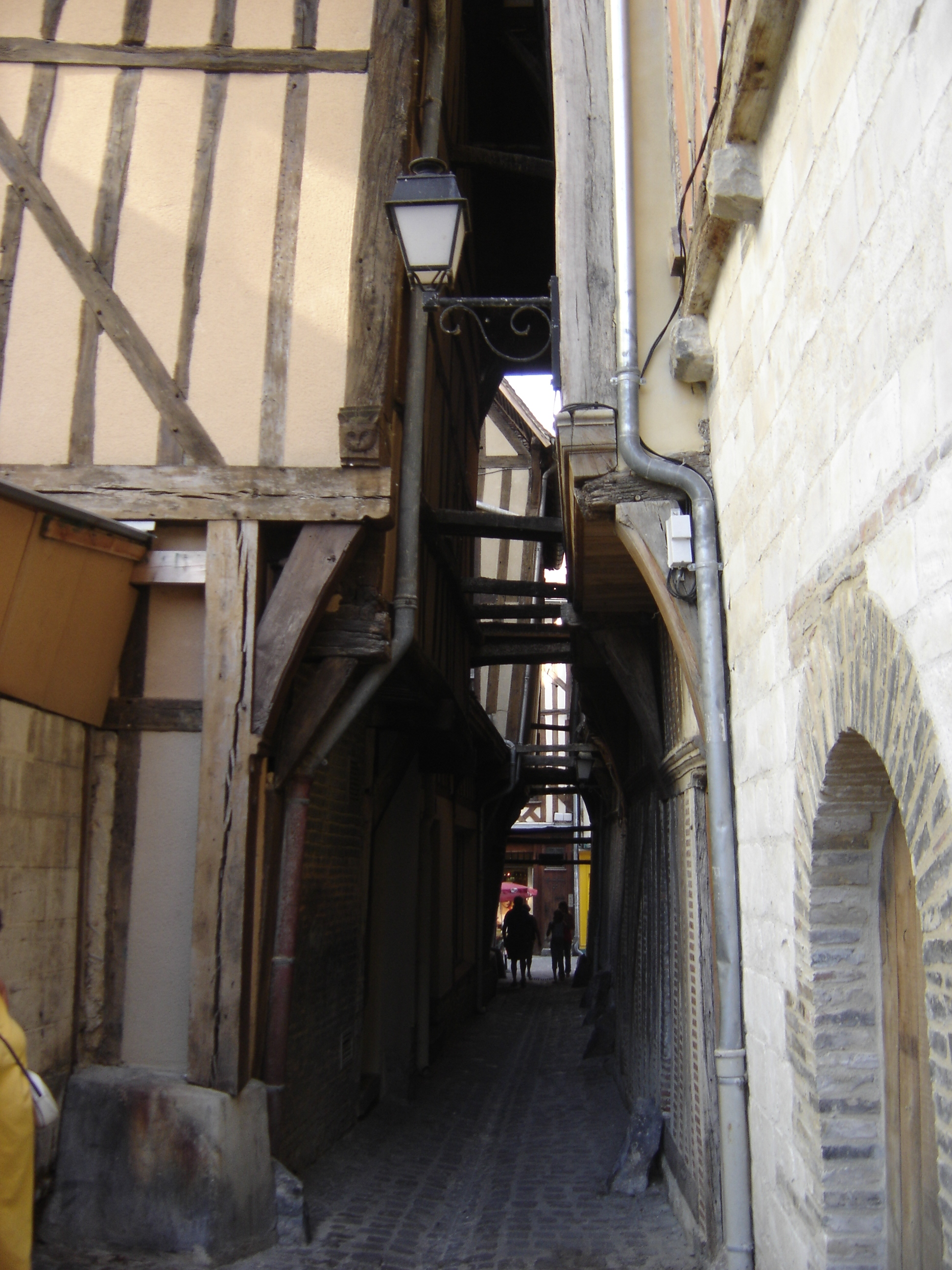 Ruelle des chats à Troyes (Aube - France)